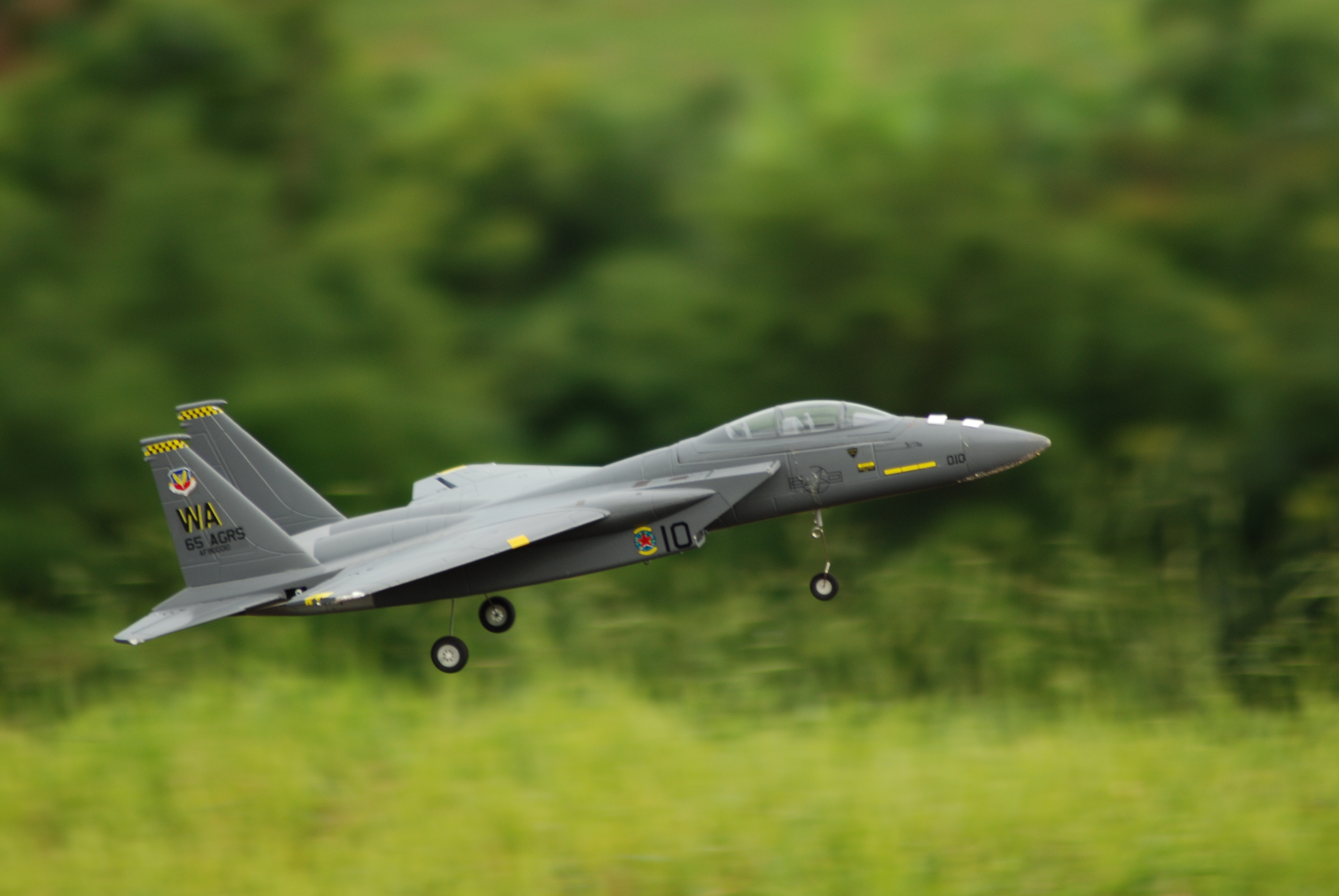 Aerocamp, Barão Geraldo, Campinas, São Paulo, Brasil